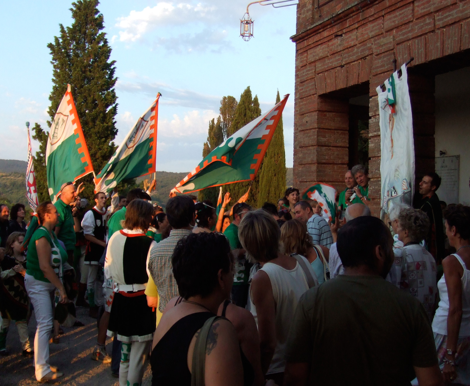 Bénédiction à l'église lors de la Giostra del Simone de Montisi